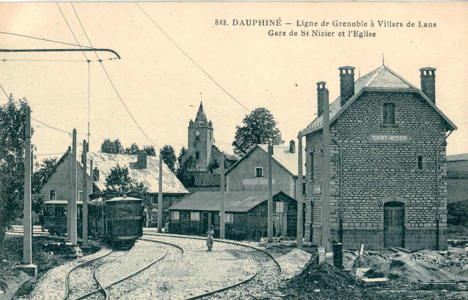 Carte postale ancienne éditée par P. Gaude à Grenoble, collection Dauphiné n°883 : Ligne de Grenoble à Villard-de-Lans : Gare de Saint-Nizier et Eglise